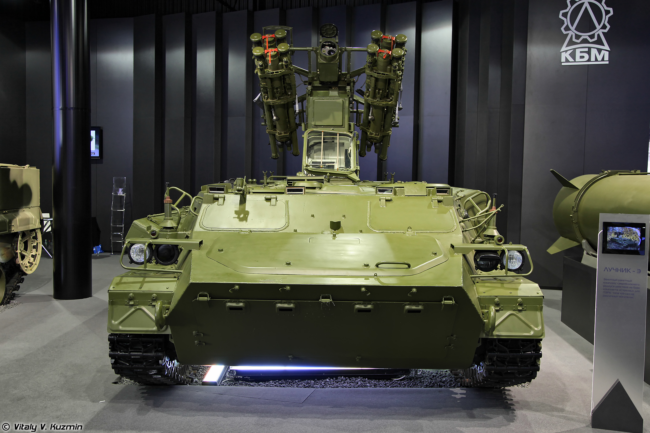 ЗРК Лучник-Э (Luchnik-E air defence system)